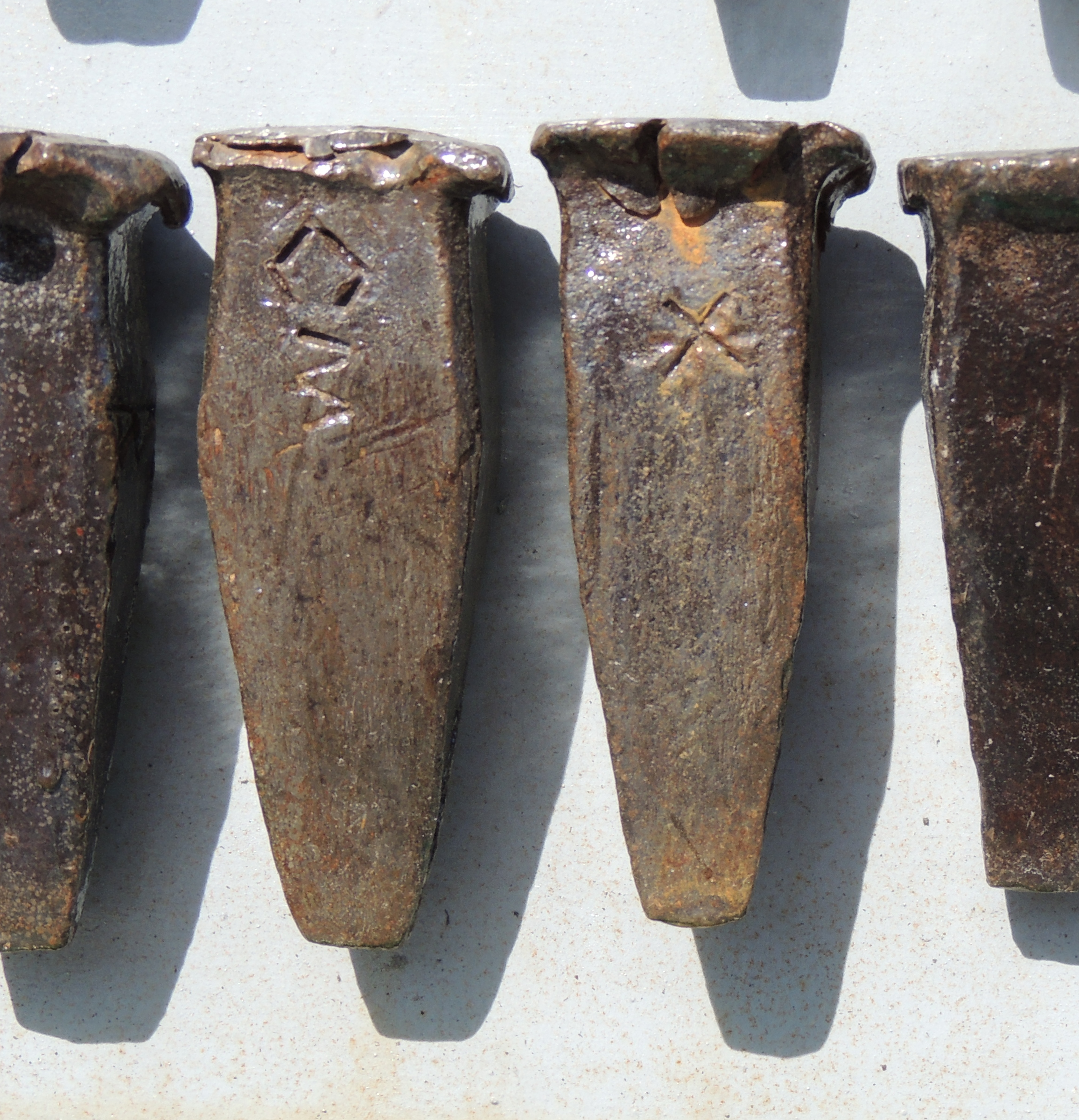 Cuña de cantero con marcas de propiedad.